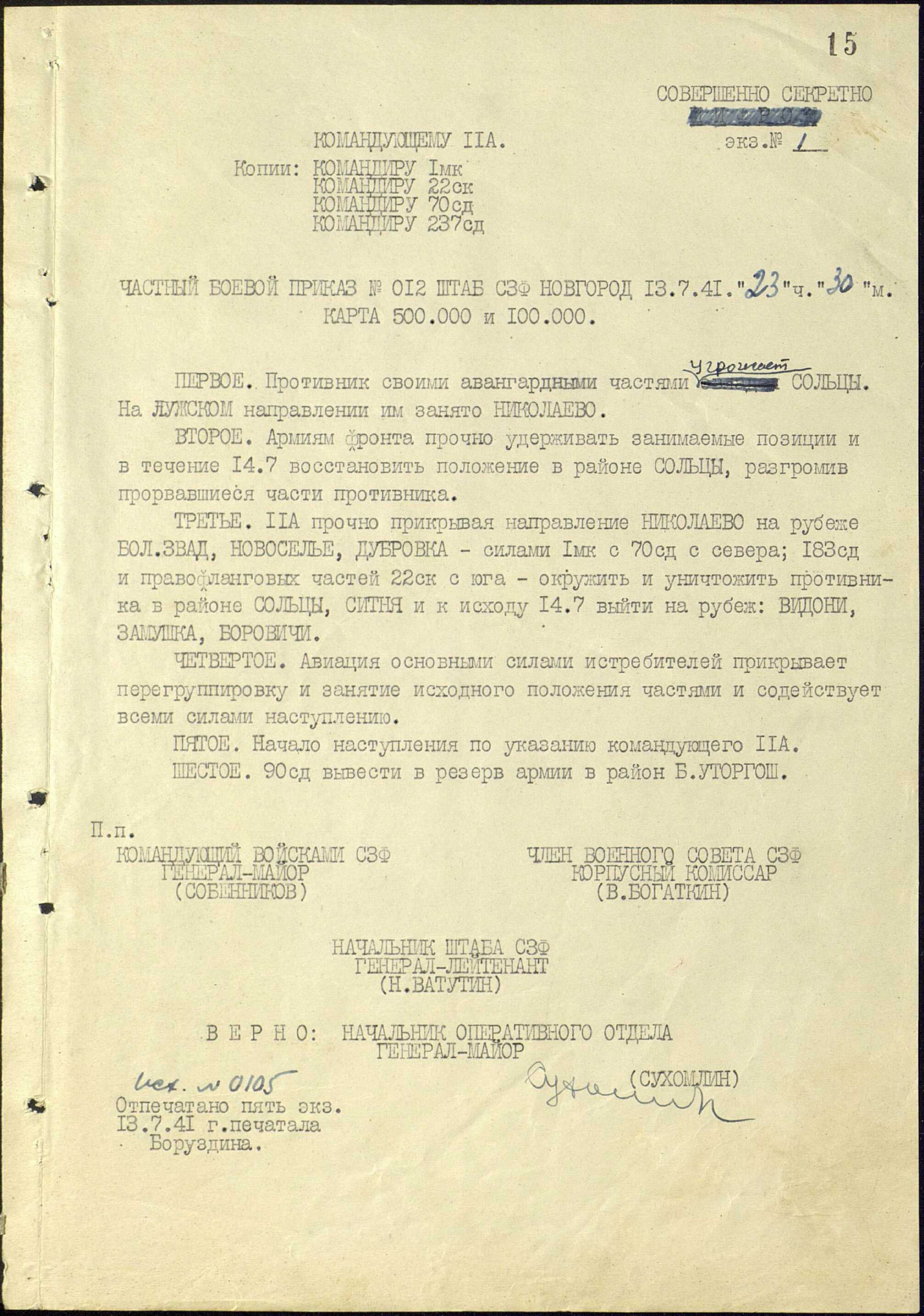 Частный боевой приказ №012 штаба СЗФ от 13.07.41